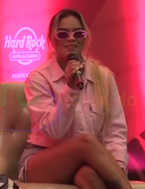 Karol G en entrevista para Telenord